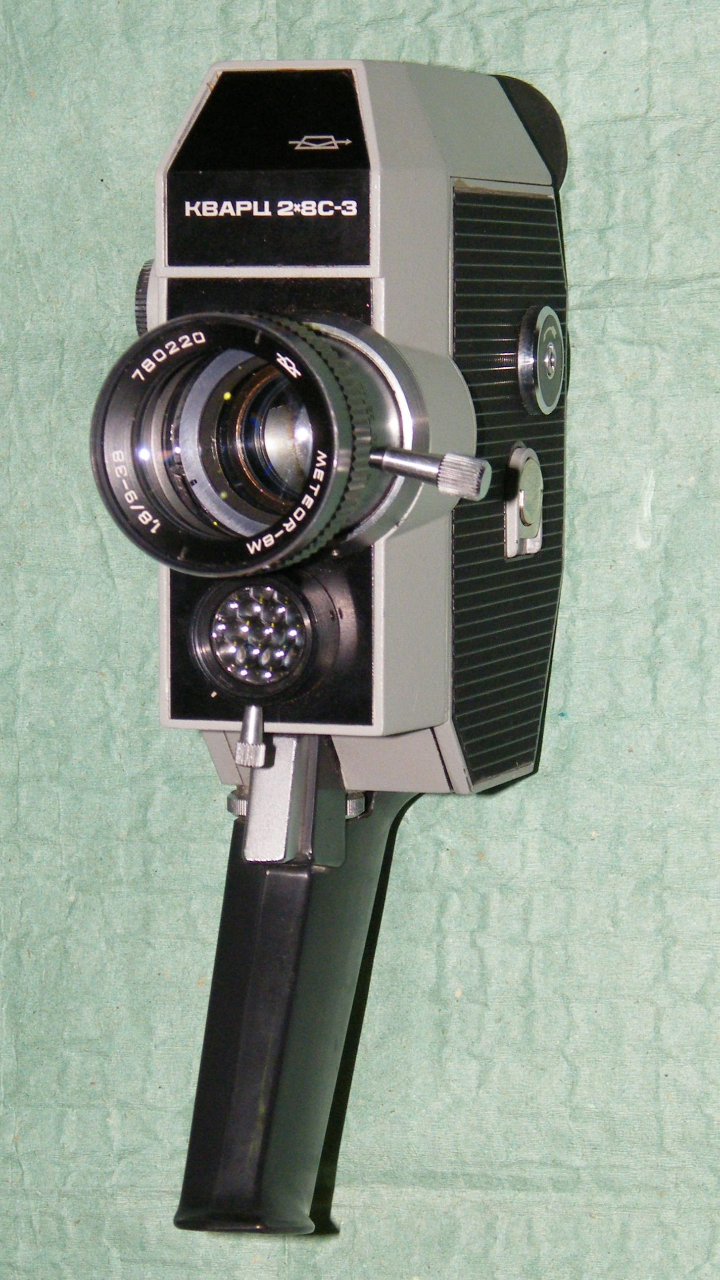 Кинокамера Кварц-2х8С-3 (КМЗ)